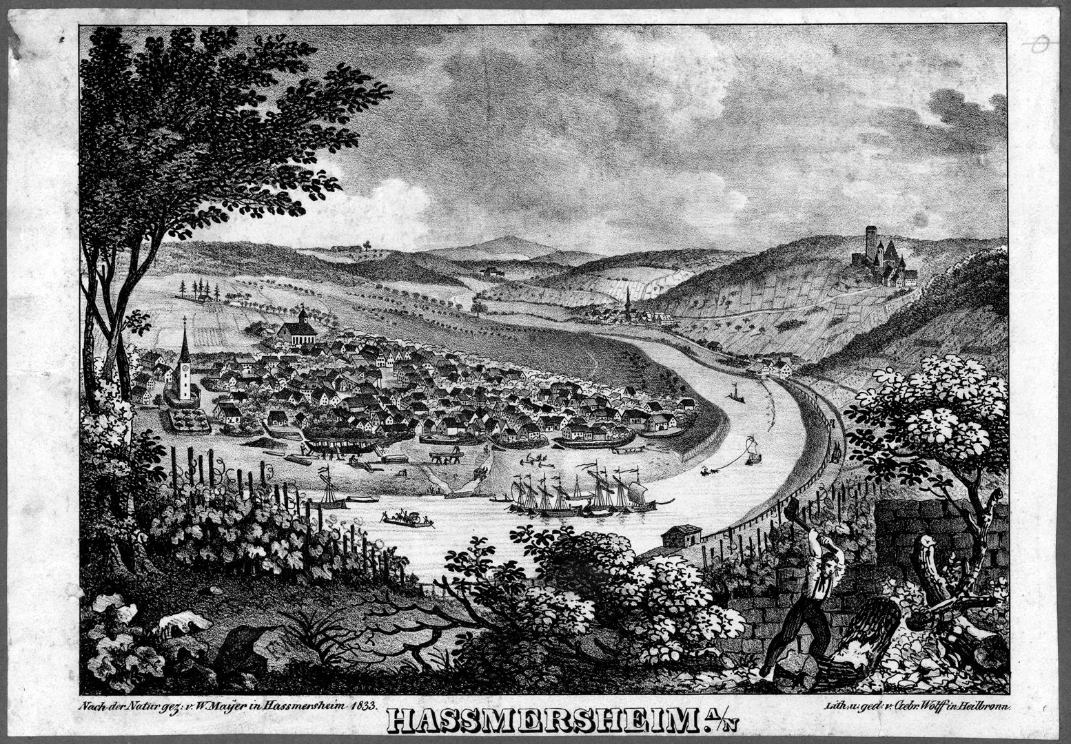 Ansicht von Haßmersheim, nach der Natur gez. v. W. Mayer in Hassmersheim 1833. Lith. u. gedr. v. Gebr. Wolff in Heilbronn.